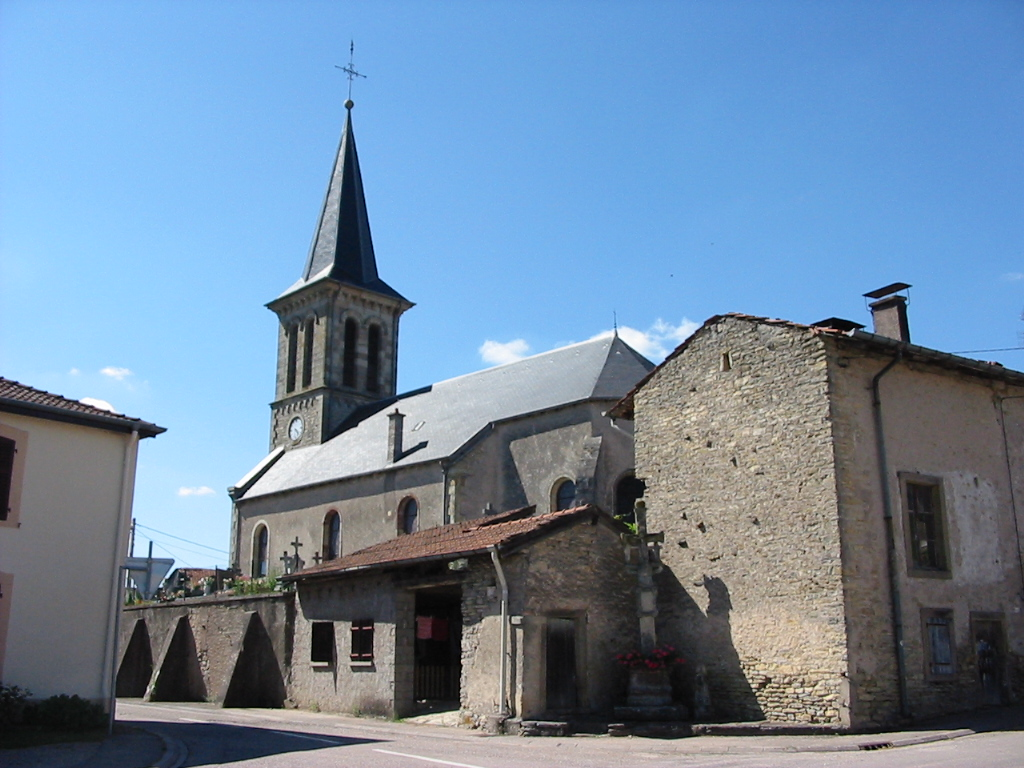 Badménil-aux-Bois, commune des Vosges. L'église Saint-Denis.